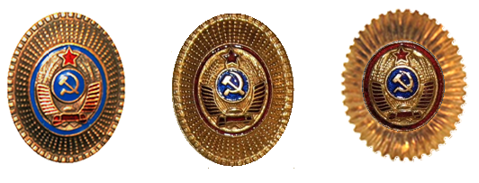 Кокарды 1947